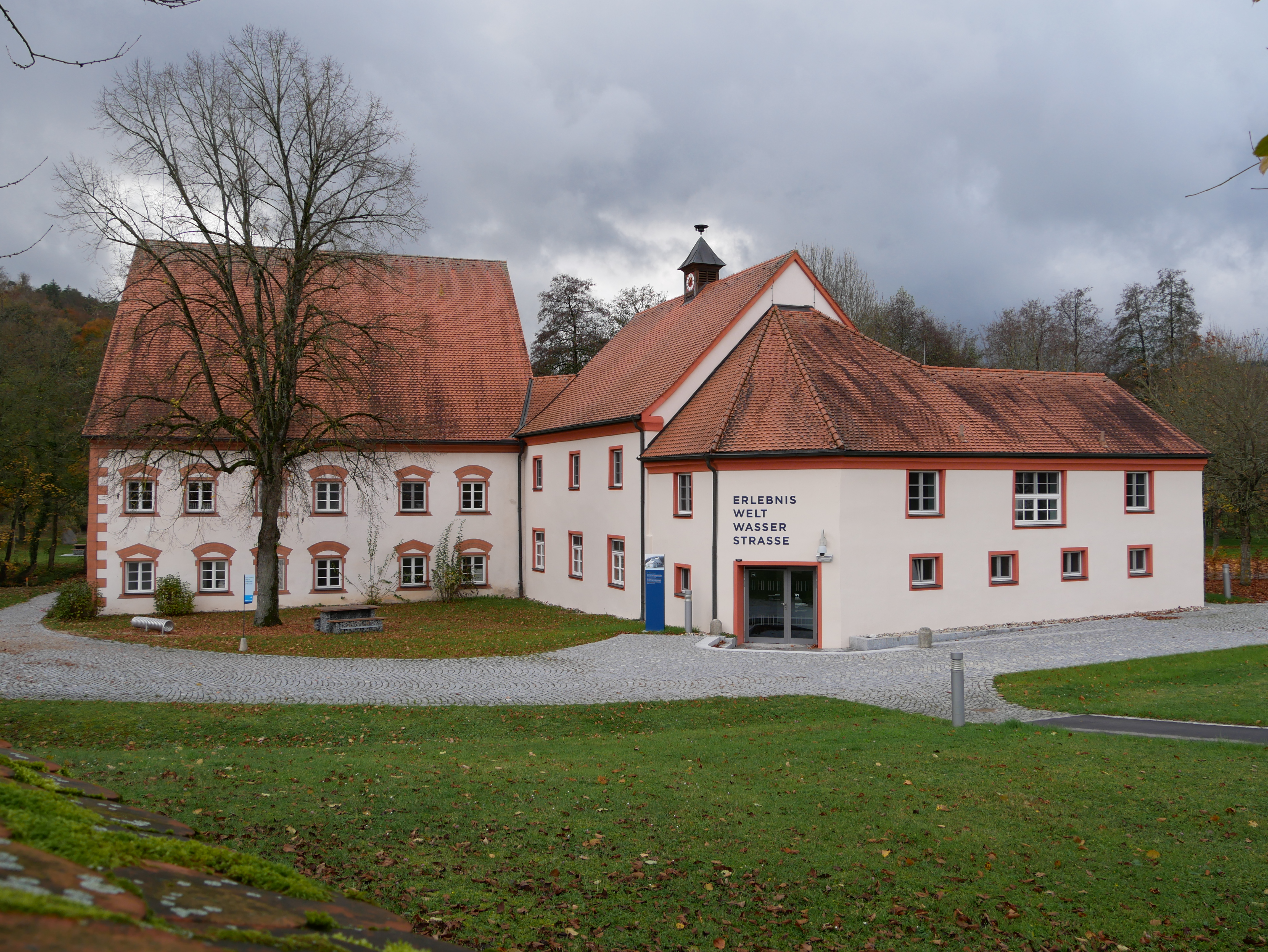 Beilngries - OT Gösselthal, Gösselthal 2: Ehem. Hofanwesen und Mühle, Ansicht von Süden